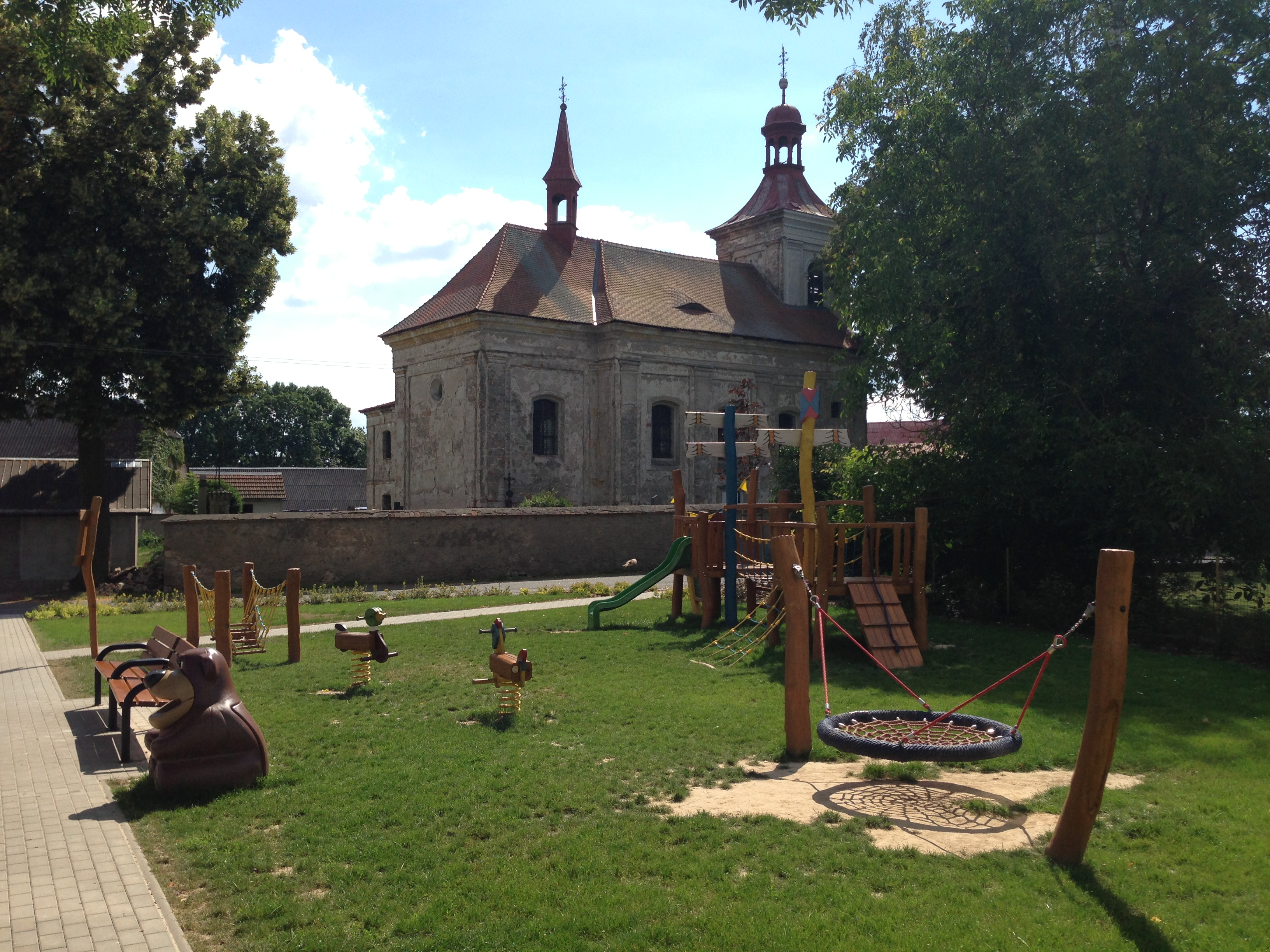 Chrám Povýšení svatého Kříže v Loukovci zde stál v nějaké podobě od nepaměti. Ve 13. století patřil Loukovec bez pochyby ke komendě v Českém Dubu čili ke Světlé. Hlavní oltář v kostele Povýšení sv. Kříže v Loukovci je dřevěný se sochami sv. Vojtěcha a sv. Prokopa v životní velikosti a s obrazem Nalezení sv. Kříže, pod nímž klečí císařovna Helena v zeleném šatě. Obraz je z půlky 18. století od stejného autora jako obraz v kostele v Bosni. V chrámu jsou ještě další dva postranní oltáře, dále kazatelna, křtitelnice, varhany a barokní lavice. Proti kazatelně je socha sv. Jana Nepomuckého.Vnitřní vybavení kostela doplňuje obraz sv. Jana Nepomuckého, dva stříbrné kalichy a cínové svícny. Na dveřích do sakristie je velice pěkný tepaný barokní zámek. Fara byla v Loukovci od nepaměti. Stála patrně na stejném místě jako ta dnešní. V roce 1700 byla postavena nová fara, ve které se do roku 1899 vystřídalo patnáct farářů, kteří sloužili bohoslužby i v obcích Březina, Jabloneček a Chocnějovice.